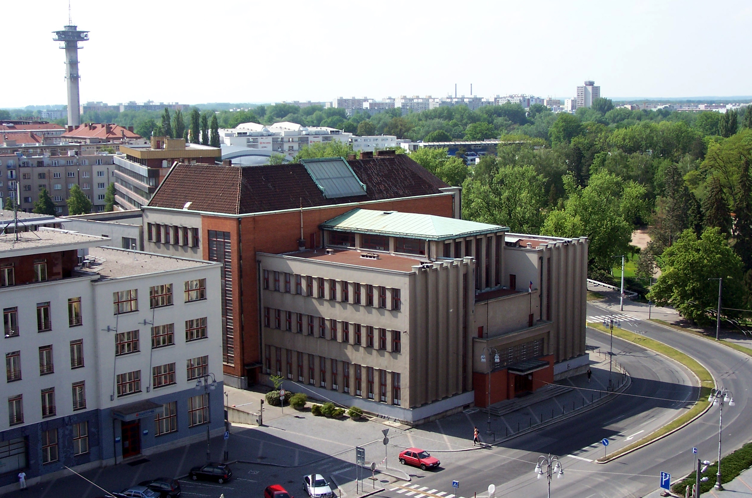 Průmyslové muzeum v Pardubicích od architekta Karla Řepy (1927 - 1931)